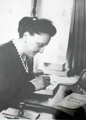 Marguerite Lebrun, épouse d'Albert Lebrun, quinzième président de la République française du 10 mai 1932 au 11 juillet 1940.